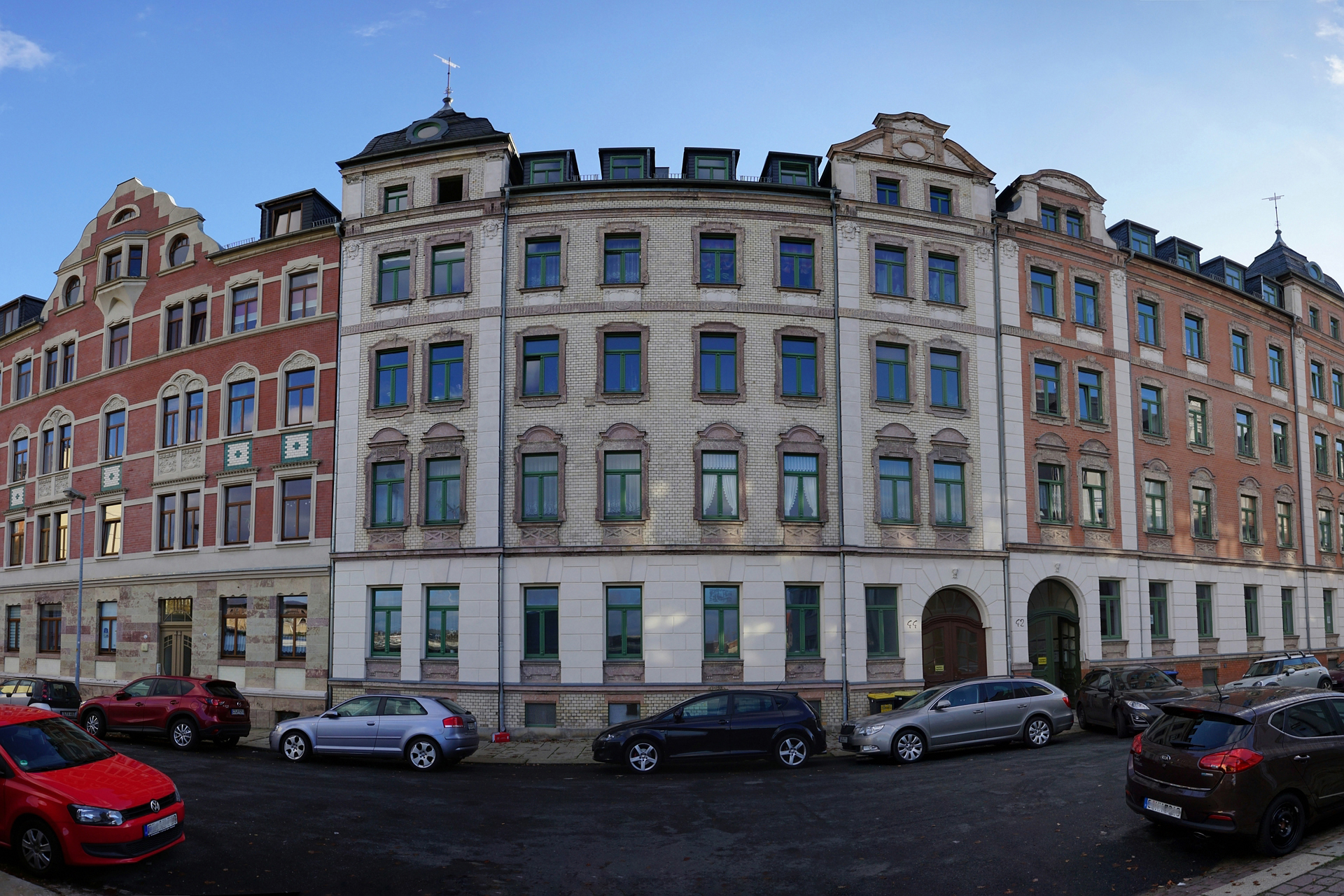 Rekonstruierte Gründerzeitfassaden an der Holbeinstraße in Chemnitz, 2015